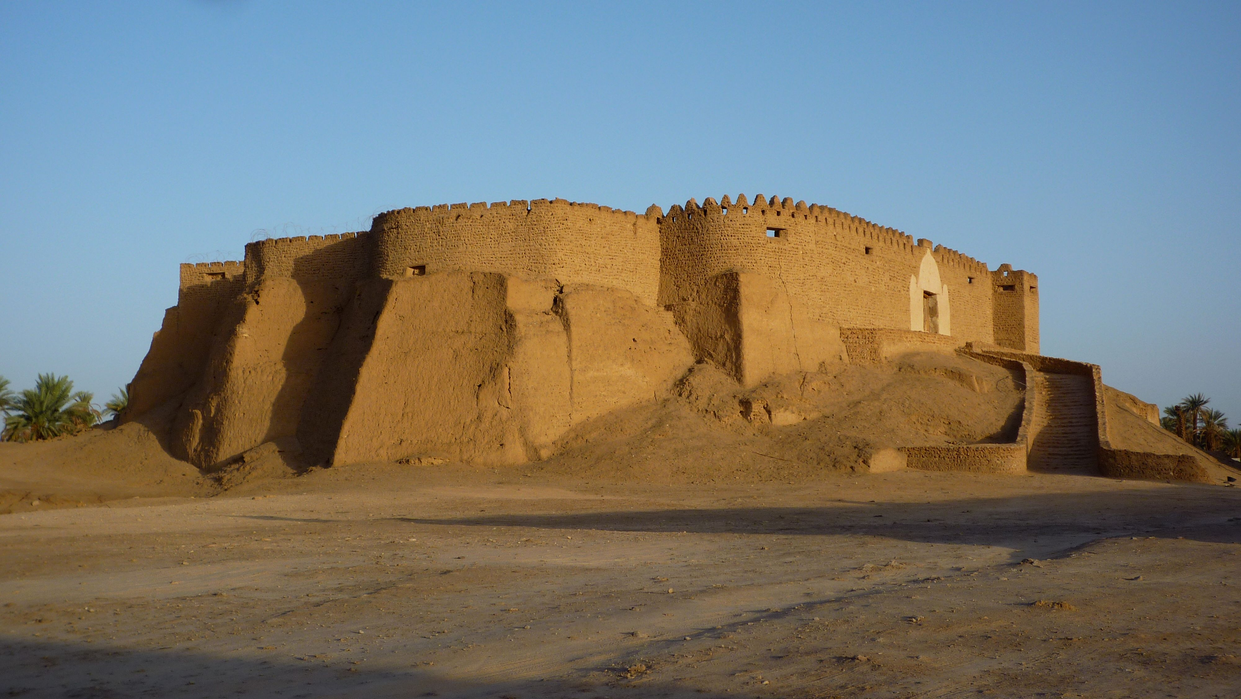 Murzuq-Festung Qala at Turk über dem Ort